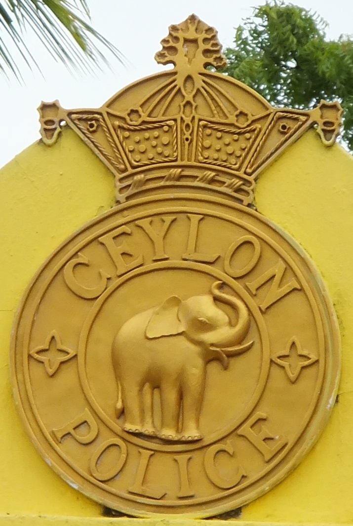 සිංහල: ක්‍රි.ව. 1866 සිට ක්‍රි.ව. 1972 දක්වා පැවති ලංකා පොලිස් බලකායේ නිල ලාංඡනය